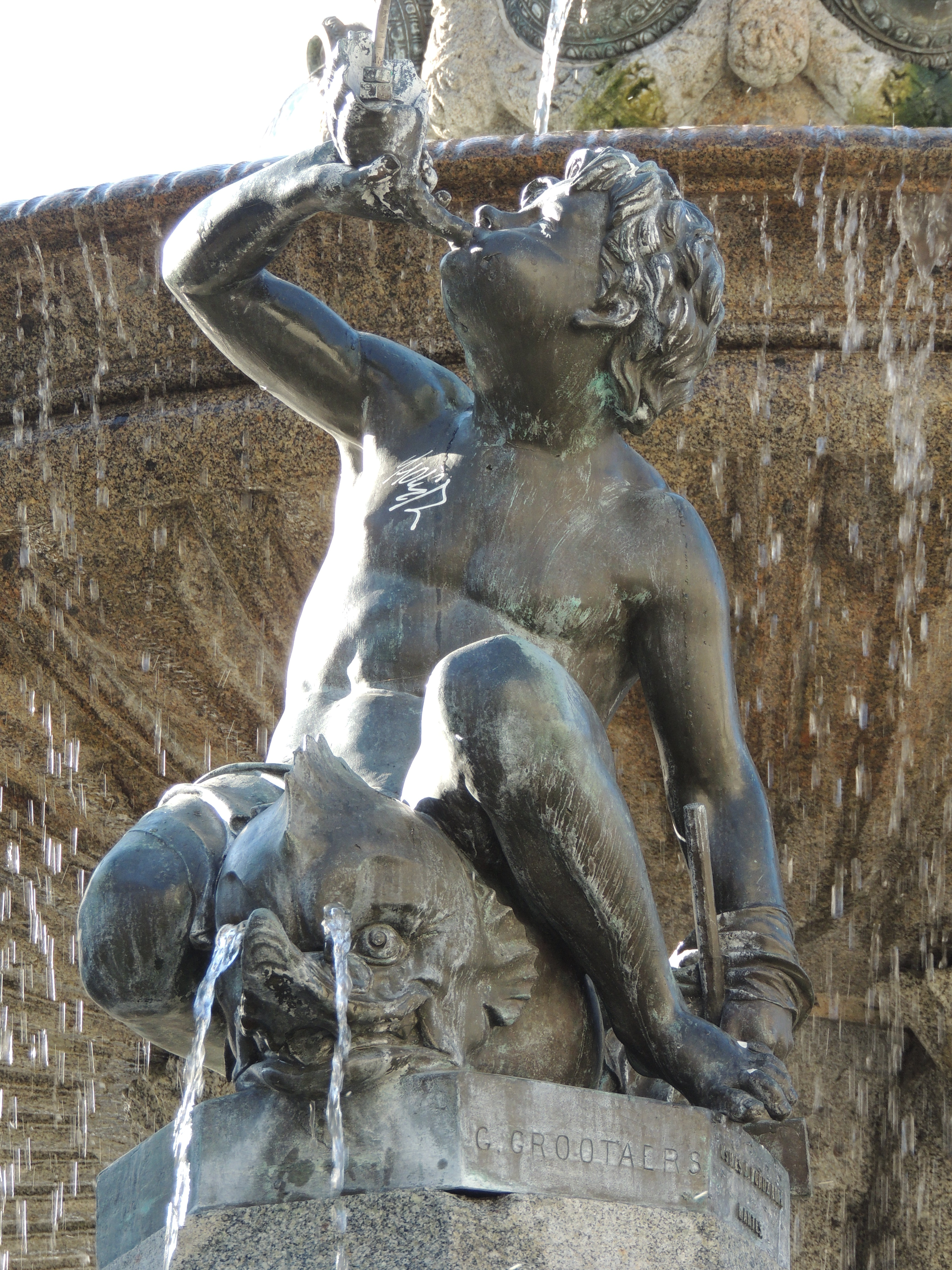 Statue allégorique, une des huit œuvres représentant un génie de l'industrie sur la fontaine de la place Royale à Nantes (France)